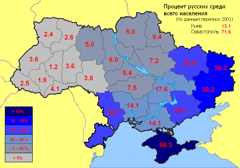 Процент русских среди всего населения по данным переписи 2001 года